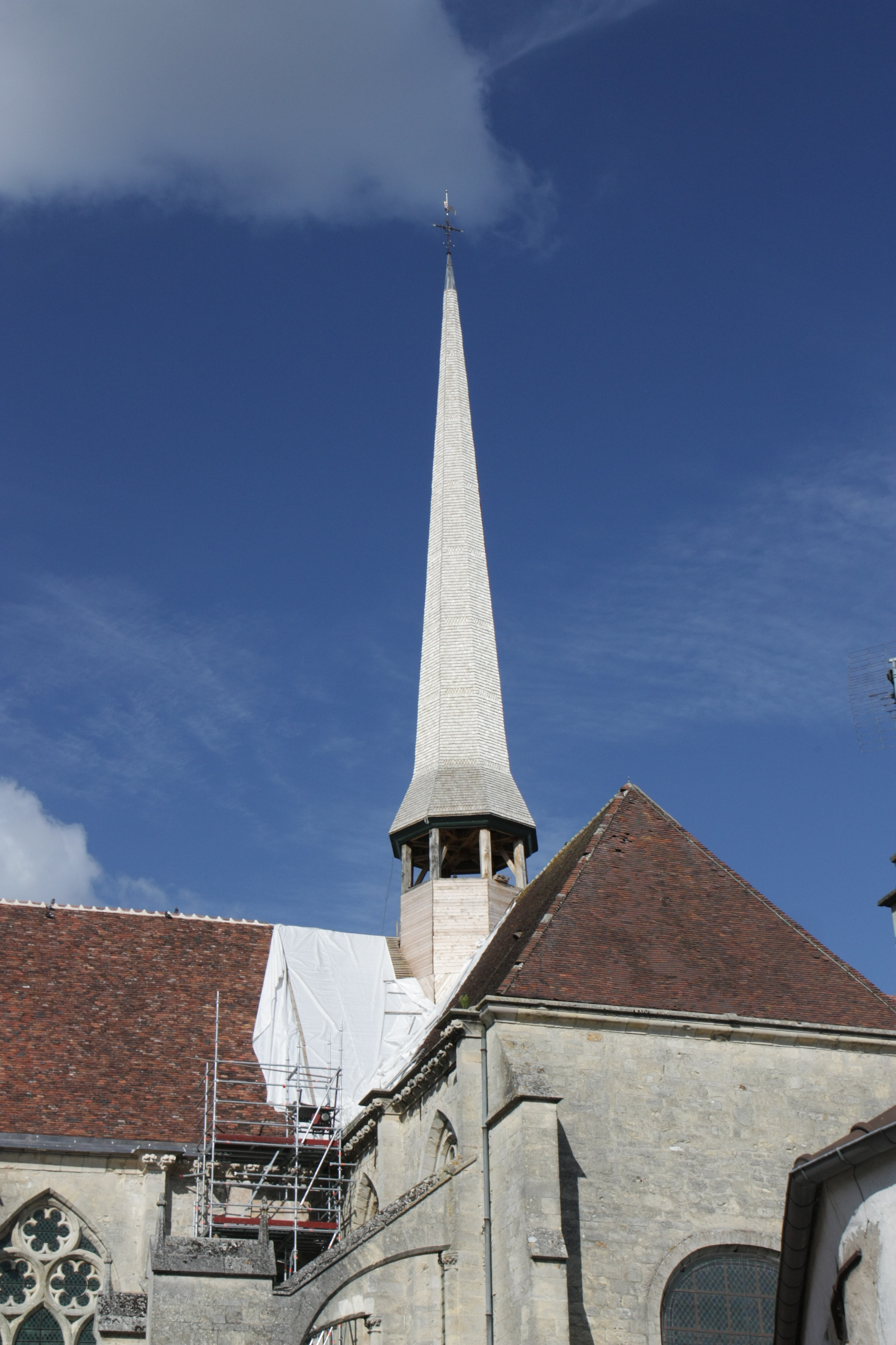 Clocher de l'église Saint-Ferréol d'Essômes-sur-Marne durant la restauration de 2011. Le clocher, dont on voit ici la charpente, est normalement recouvert d'ardoises. .